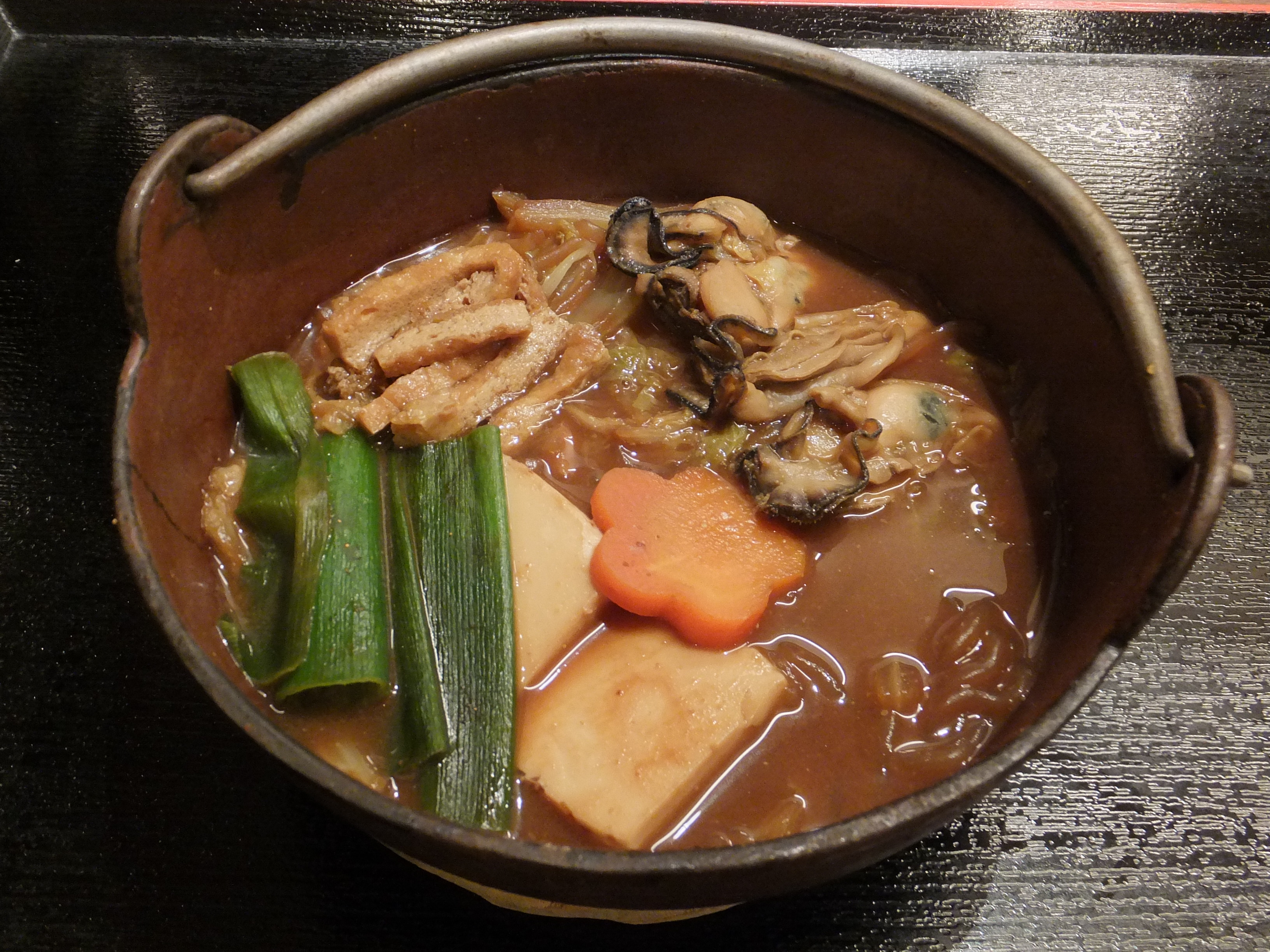 牡蠣の土手鍋。ザめしやにて